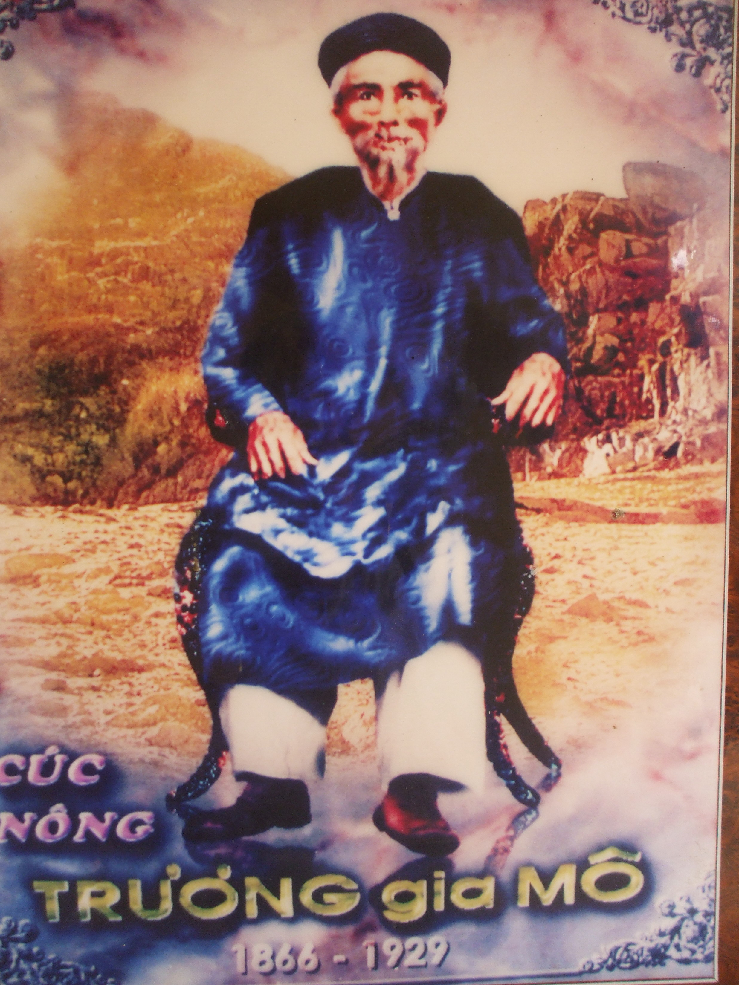 Chân dung Trương Gia Mô.